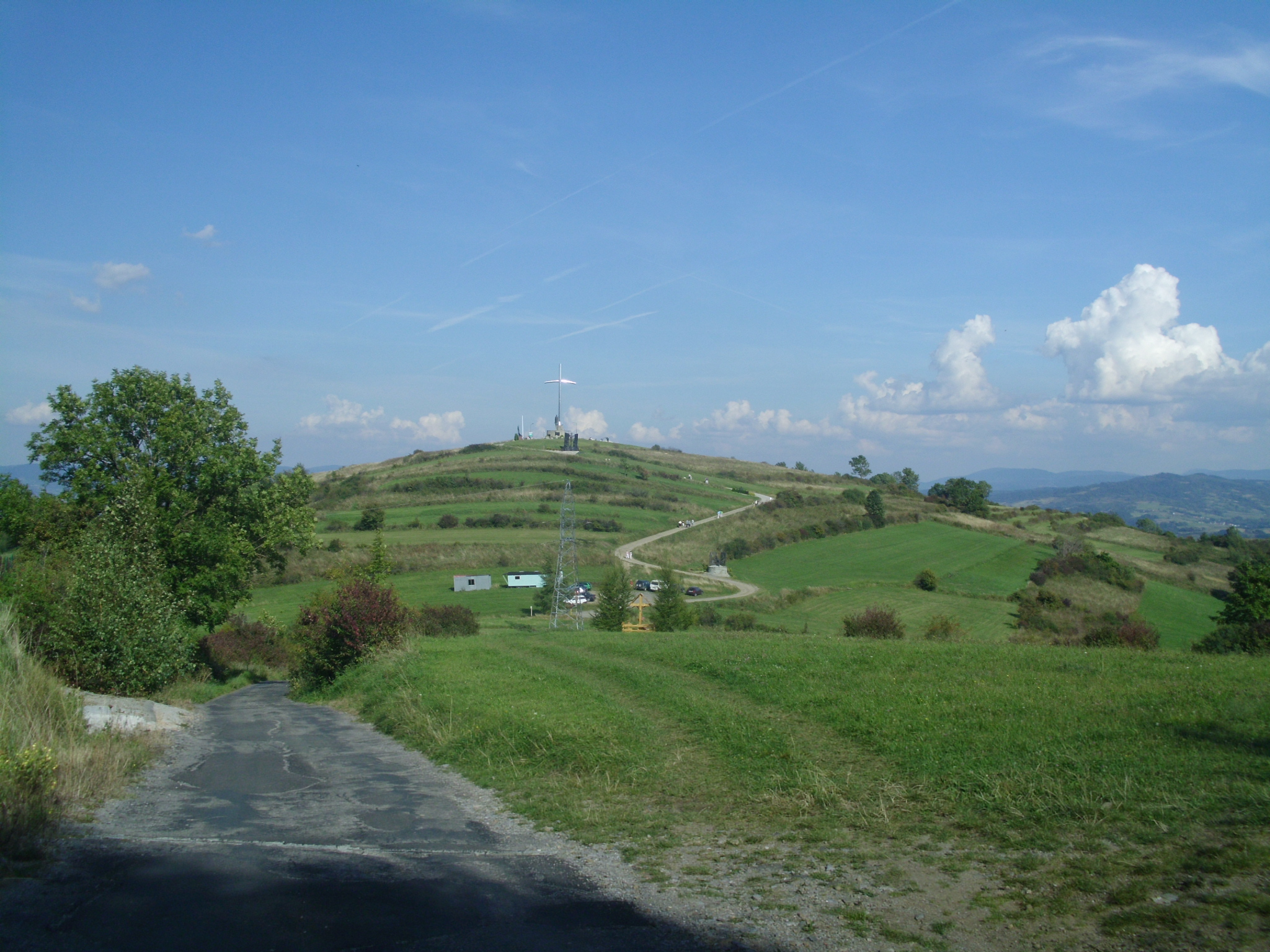 Ulica Suchedla - widok w kierunku ulicy Zielonej i Matyski. Widoczny krzyż przydrożny, a w tle Matyska z Krzyżem Millenijnym i kilkoma stacjami drogi krzyżowej.